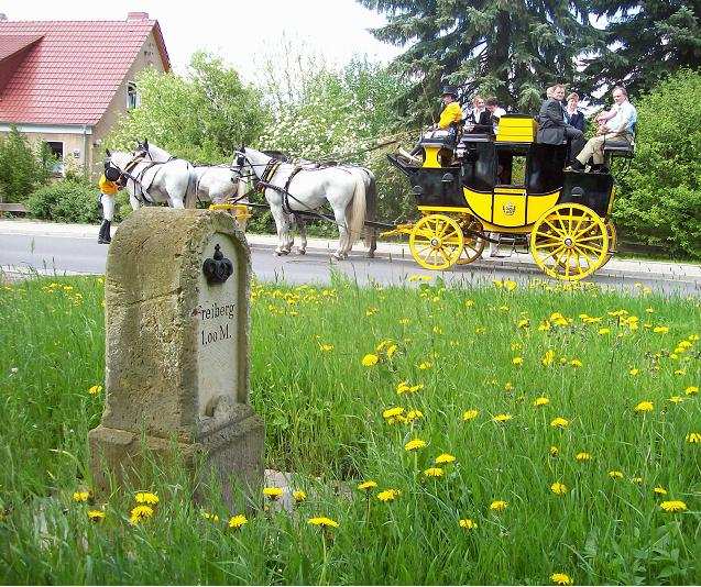 Kgl.-sächs. Ganzmeilenstein mit Kgl.-sächs. Postkutsche in Naundorf am Tharandter Wald